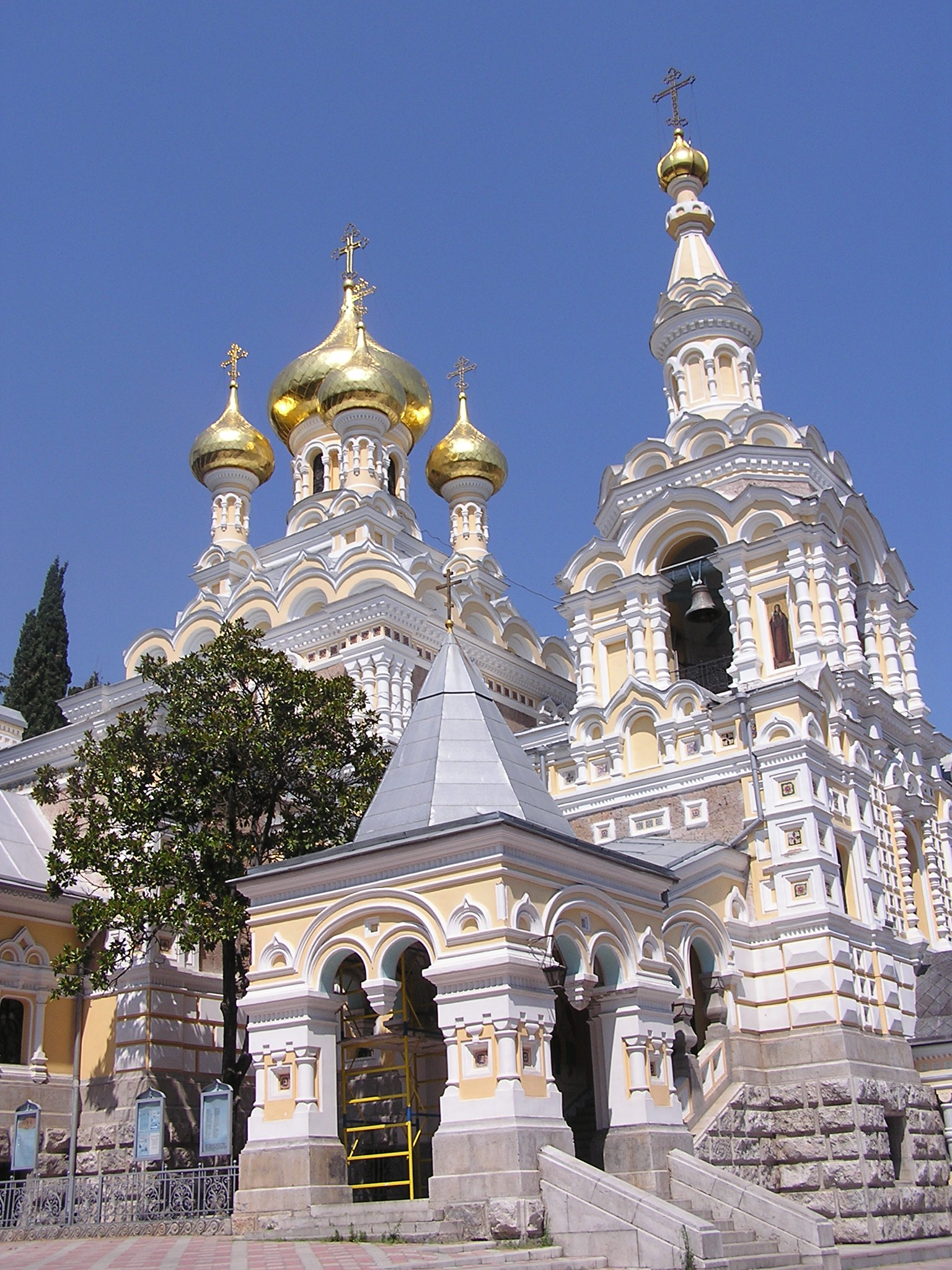 Ялта